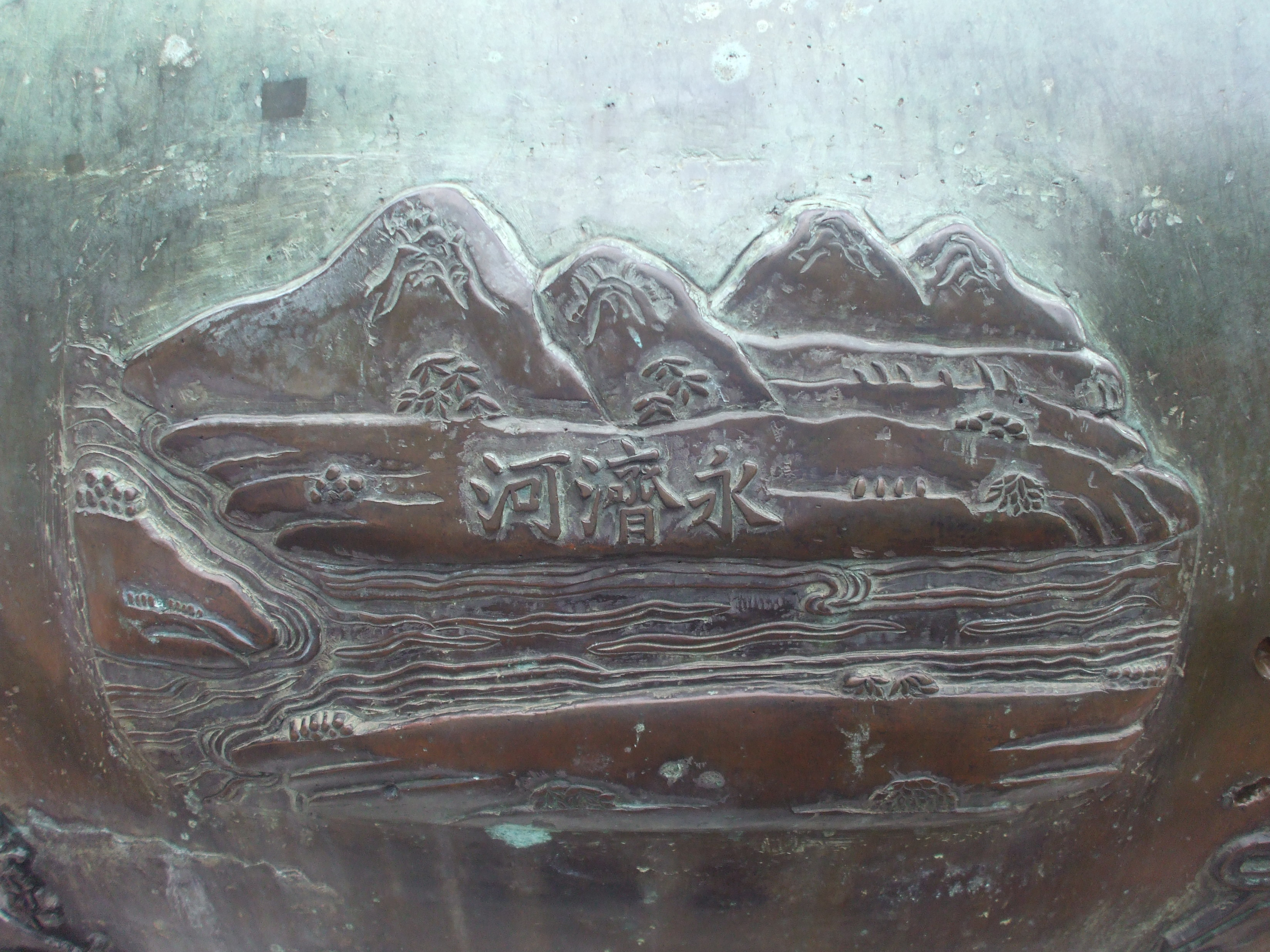 Hình kênh Vĩnh Tế được chạm khắc trên Cao đỉnh (Huế, Việt Nam).